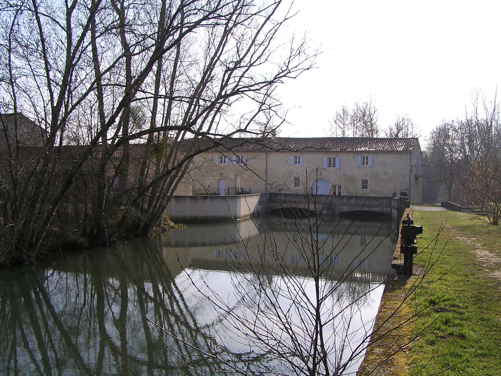 moulin de Preziers sur l'Antenne et sa chaussée